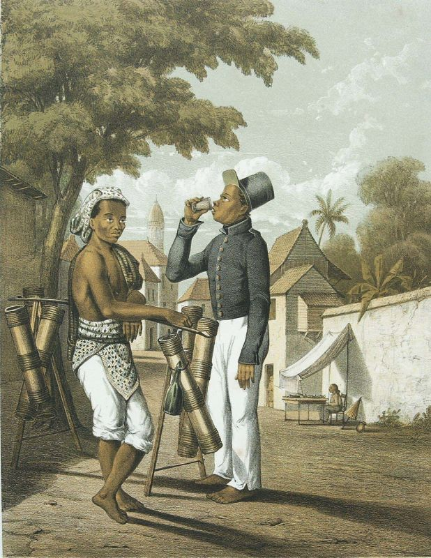 Litho. Litho naar een oorspronkelijke tekening van A. van Pers. Serie van losse gelithografeerde platen.. Een palmwijnverkoper en een inheemse soldaat